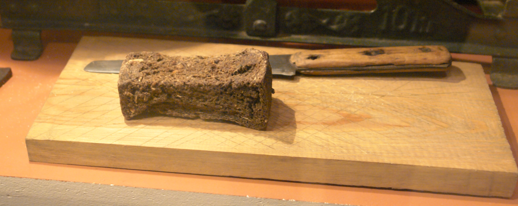 Блокадный хлеб. Порция на одного человека. Музей блокады Ленинграда